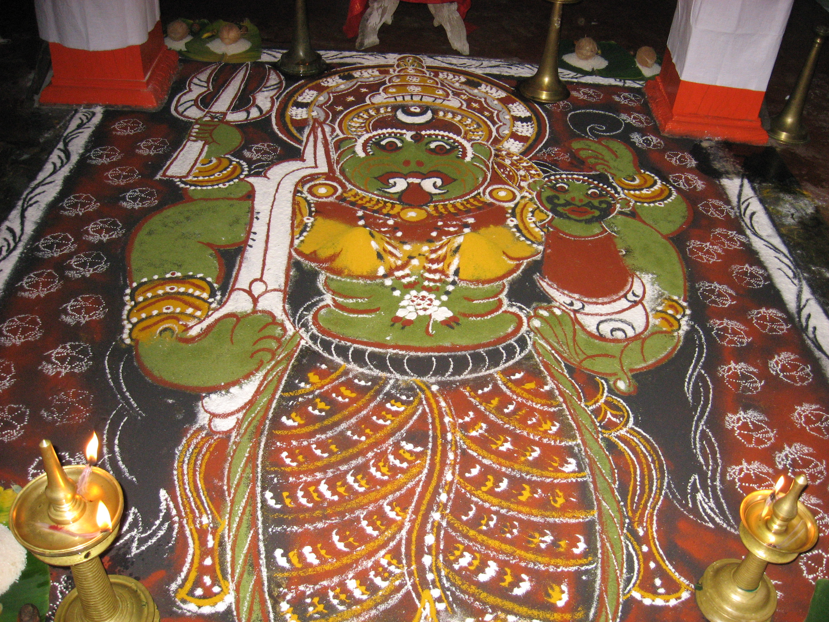 കളം- ഭഗവതിക്കാവുകളിൽ അനുഷ്ഠാന ഭാഗമായി വരക്കുന്ന കോലം